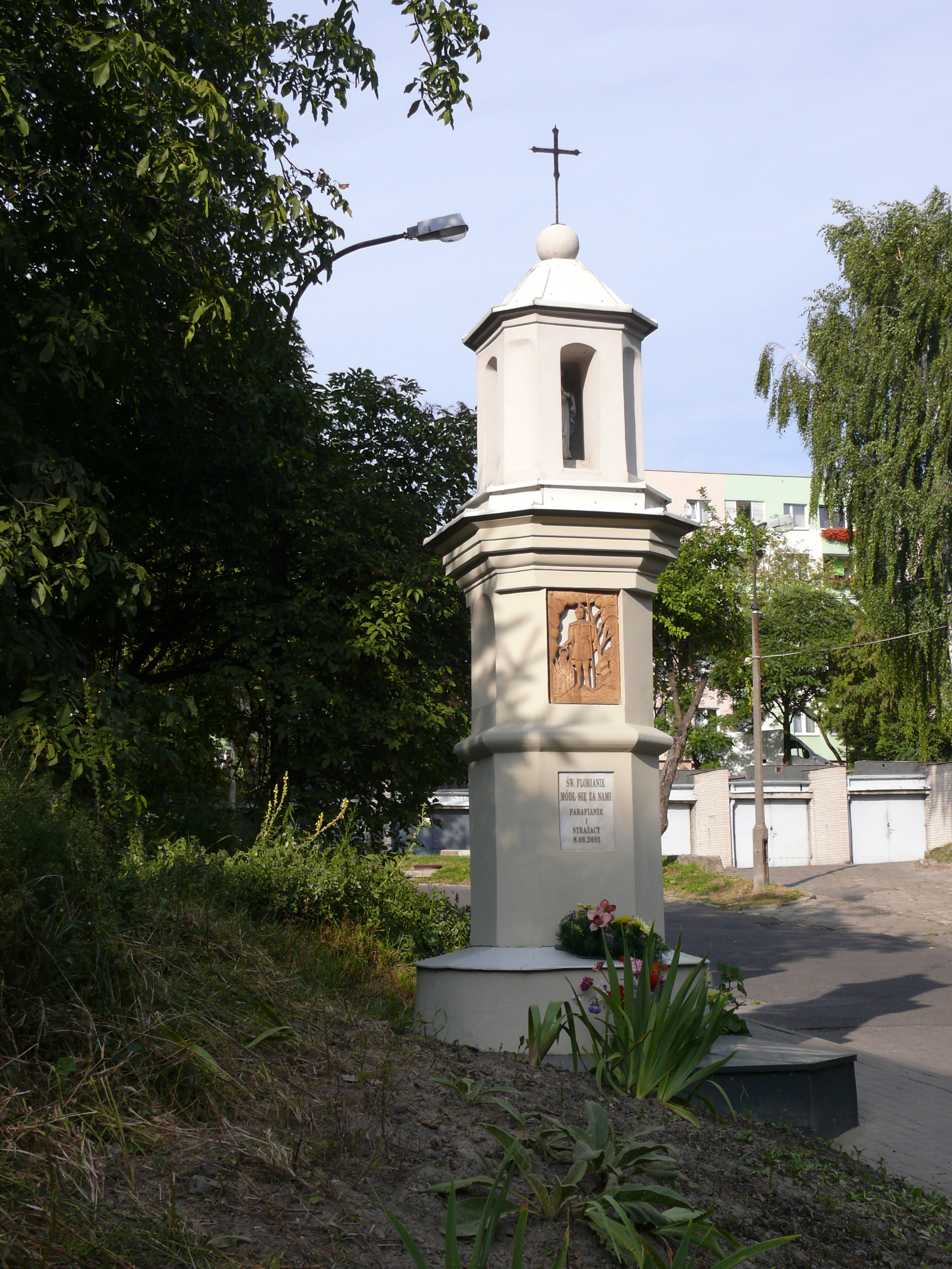 kapliczka św. Floriana, patrona strażaków, stojąca w Lublinie przy ul. Kalinowszczyzna